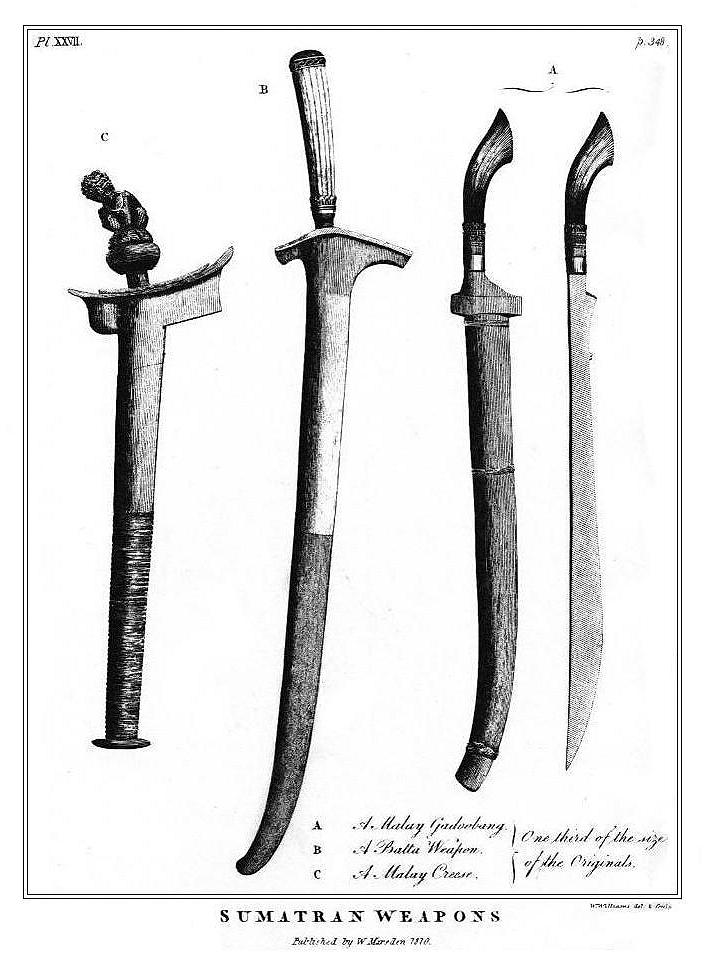 William Marsden: The History of Sumatra. Tafel XXVI: Sumatran Weapons